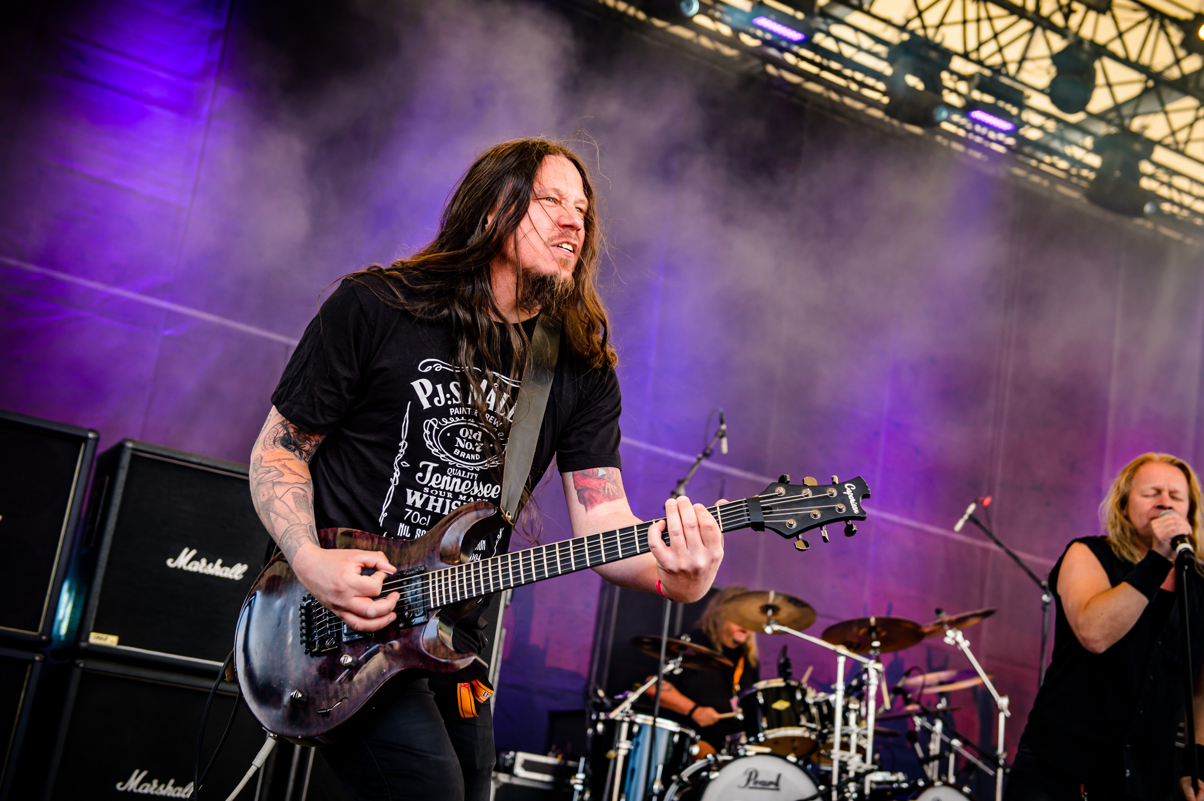 'Rock Hard Festival 2018; Amphitheater Gelsenkirchen': 'Nocturnal Rites'